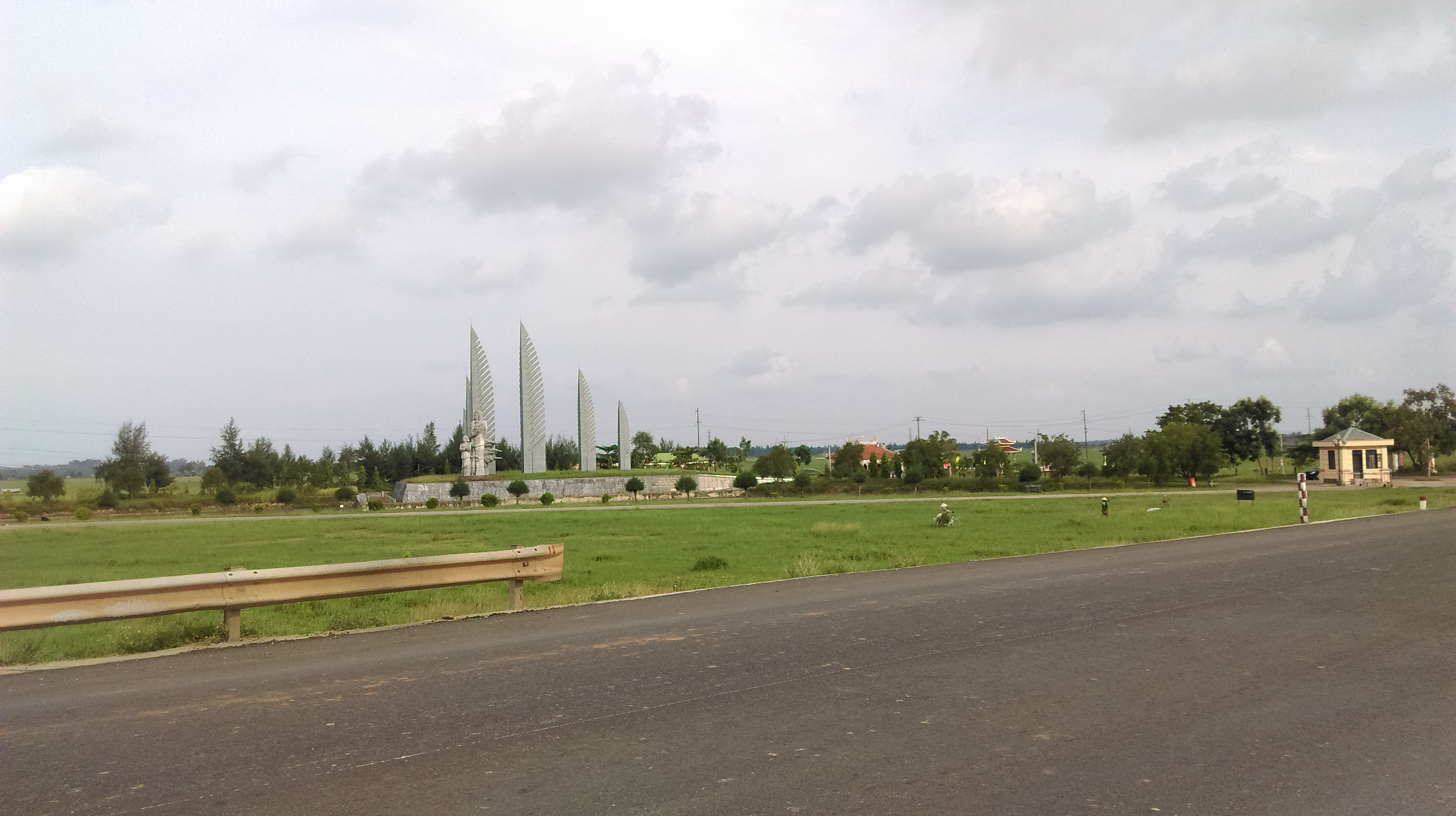 Đài Tưởng niệm Khát vọng Thống nhất, Gio Linh, Quảng Trị